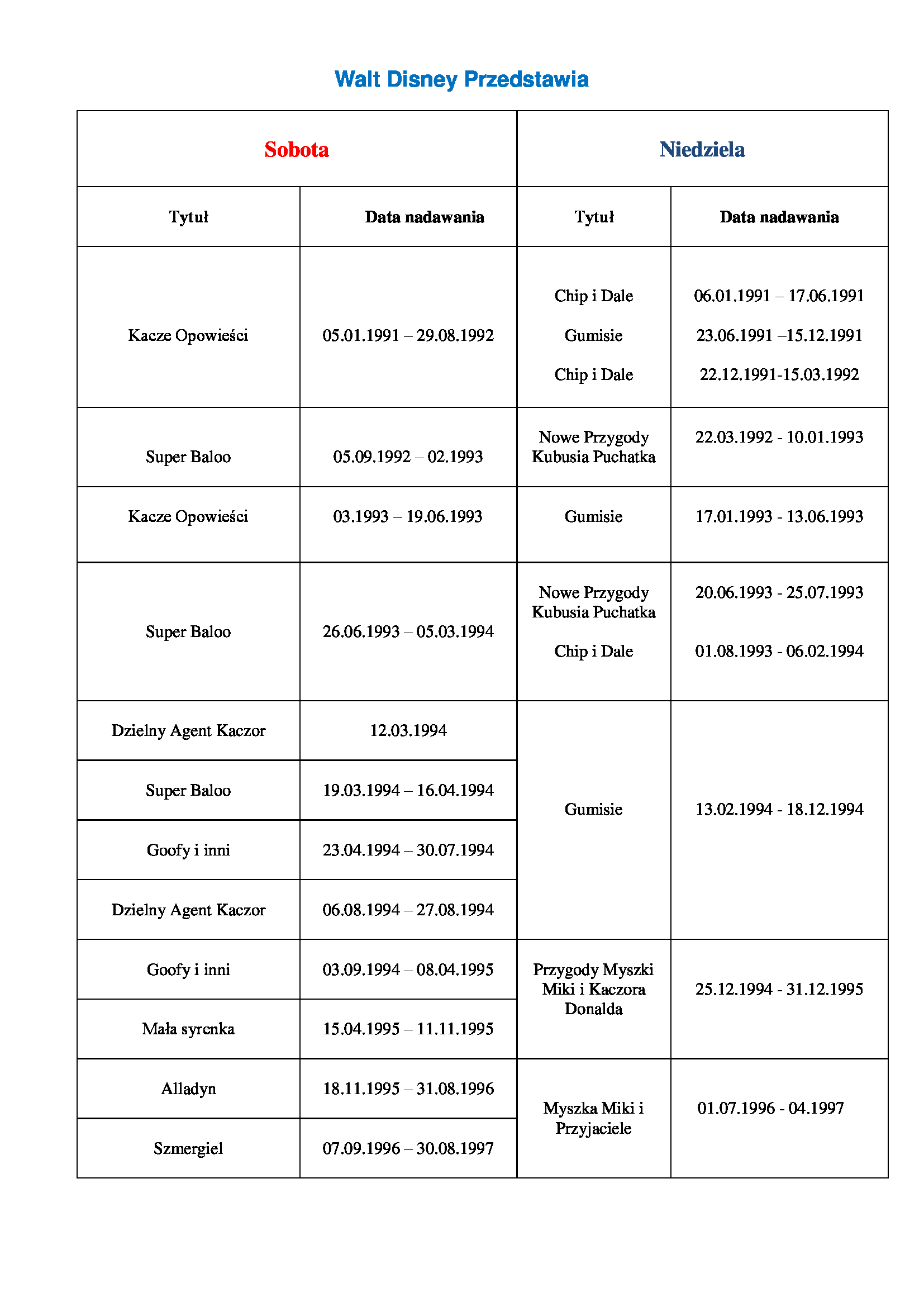 Chronologiczne zestawienie seriali animowanych emitowanych w ramach bloku Walt Disney Przedstawia